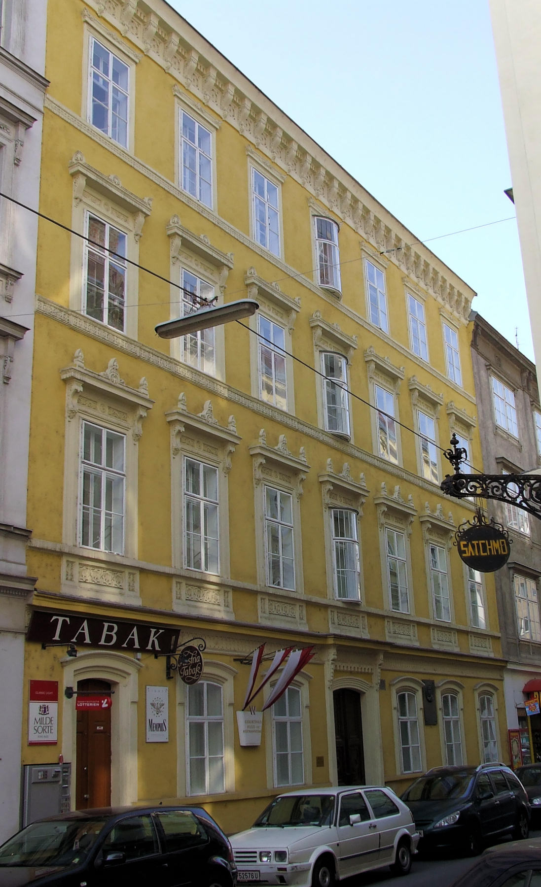 Geburtshaus von Hugo von Hofmannsthal im 3. Bezirk in Wien, Salesianergasse 12